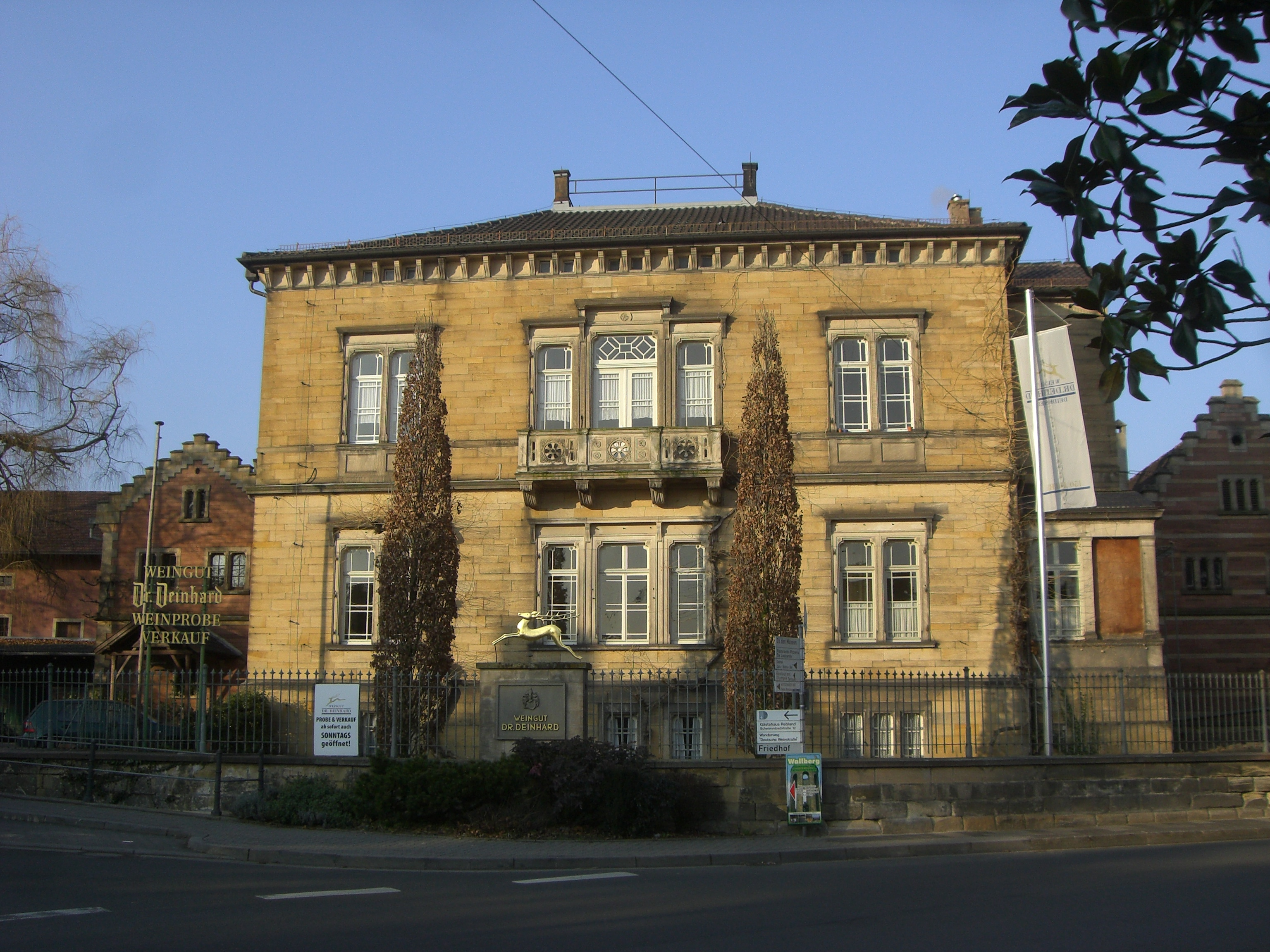 Das Herrenhaus des Weinguts Dr. Deinhard